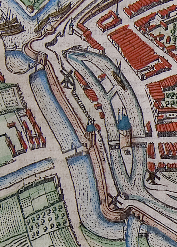 Uitsnede van het Menrediep en omgeving op de kaart van Braun & Hogenberg uit 1575. De situatie is die van rond 1550, want daarna is het diep langzamerhand gedempt.